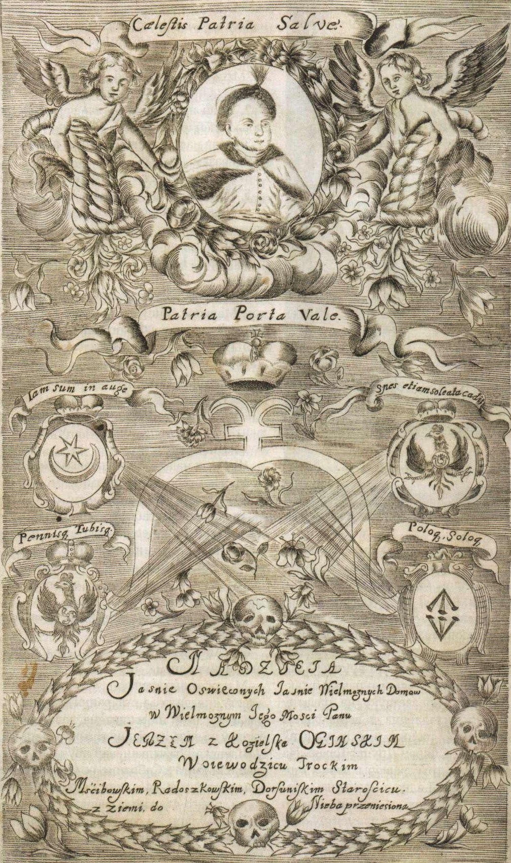 Беларуская (тарашкевіца): Панэгірык на сьмерць Юрыя Агінскага (Jury Aginski)